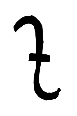 Тамга Хайду, монгольского правителя в Средней Азии. Прорисовка с монеты (